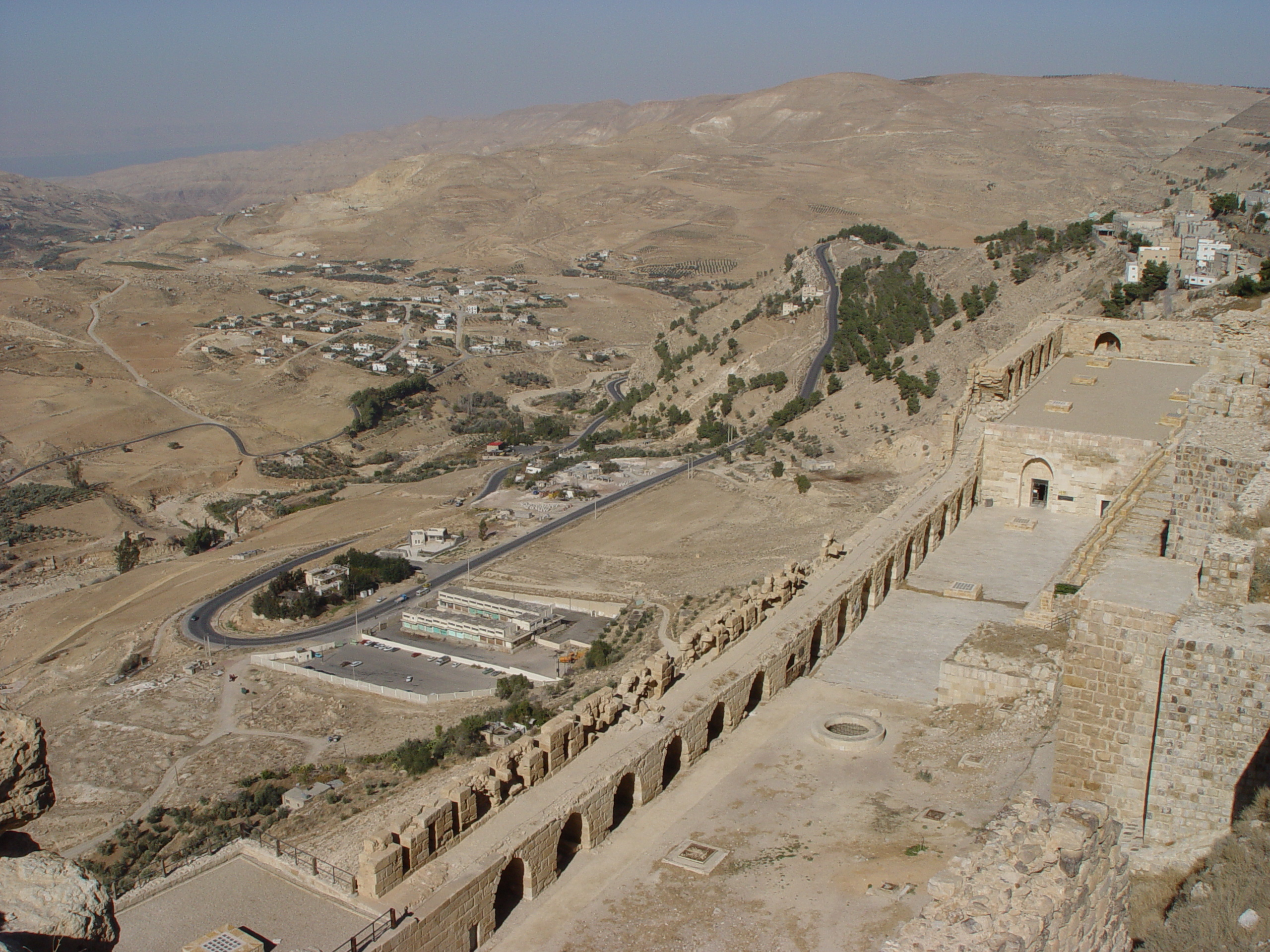 The Karak crusader castle In Karak City in Jordan